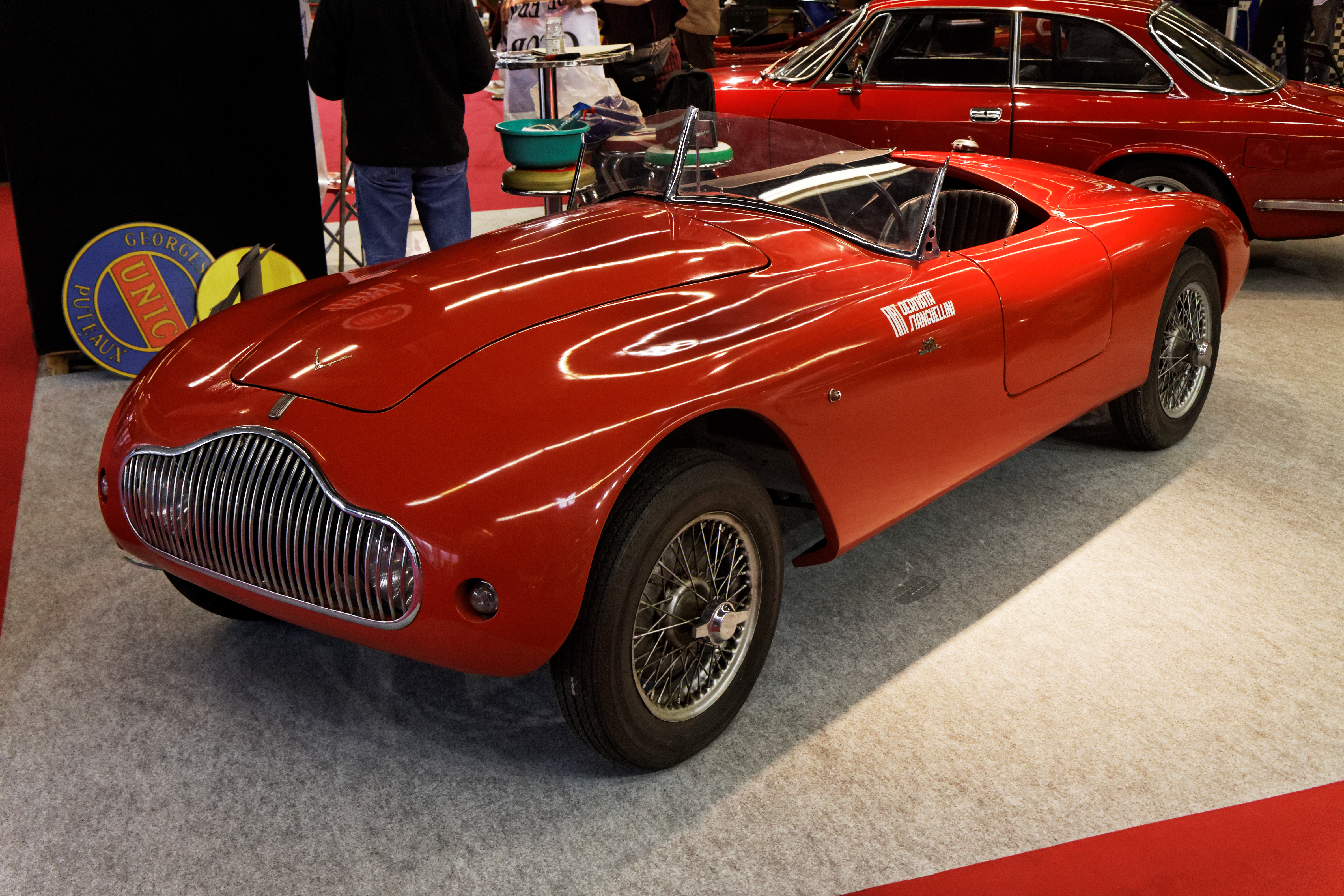 Une Fiat Stanguellini 1100 Nationale présentée lors du salon Retromobile 2013.